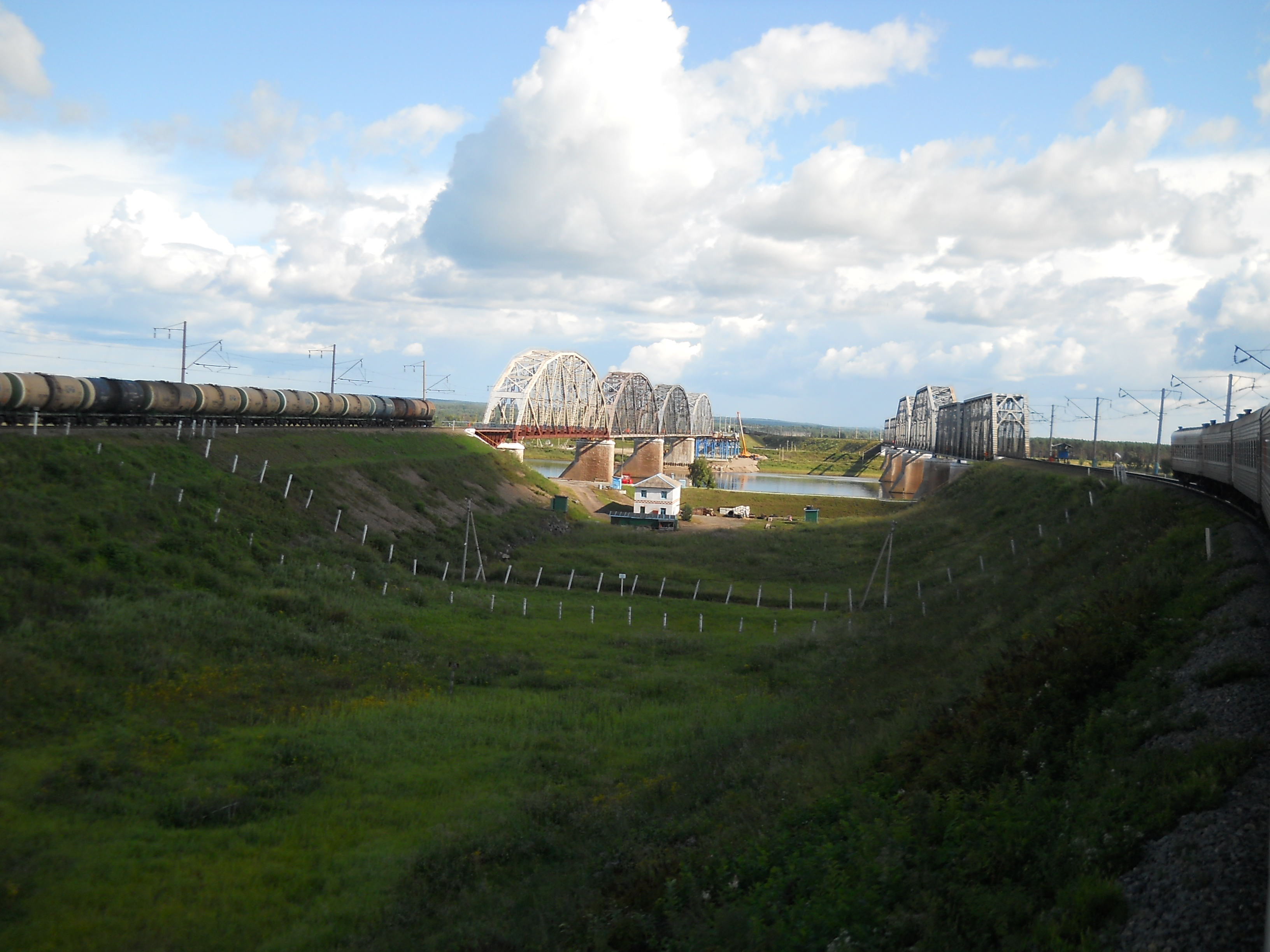 Мосты через реку.